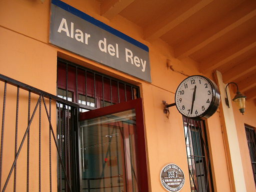 Cámara utilizada: BenQ DC C640